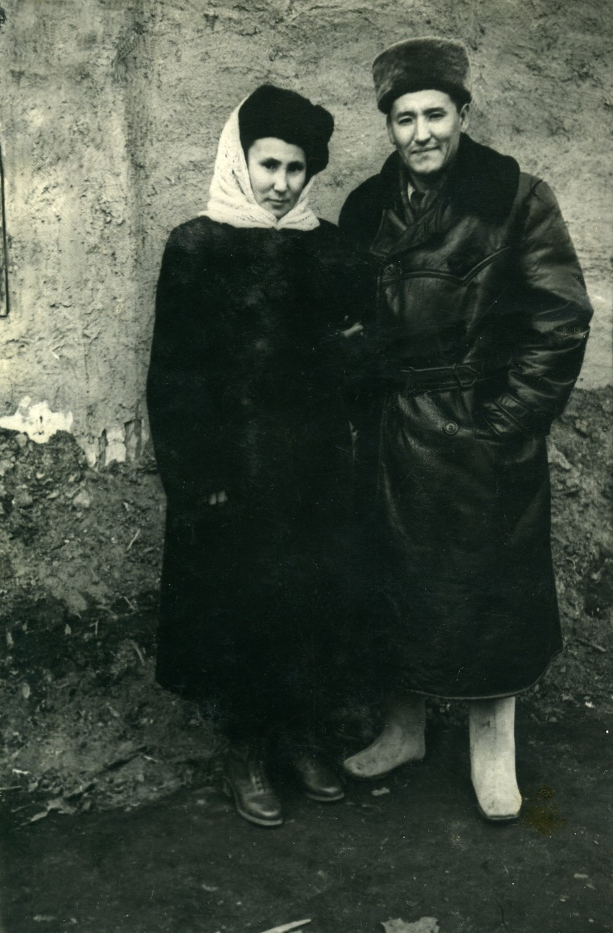 Писатель Лев Львович Габышев с супругой Натальей Иннокентьевной